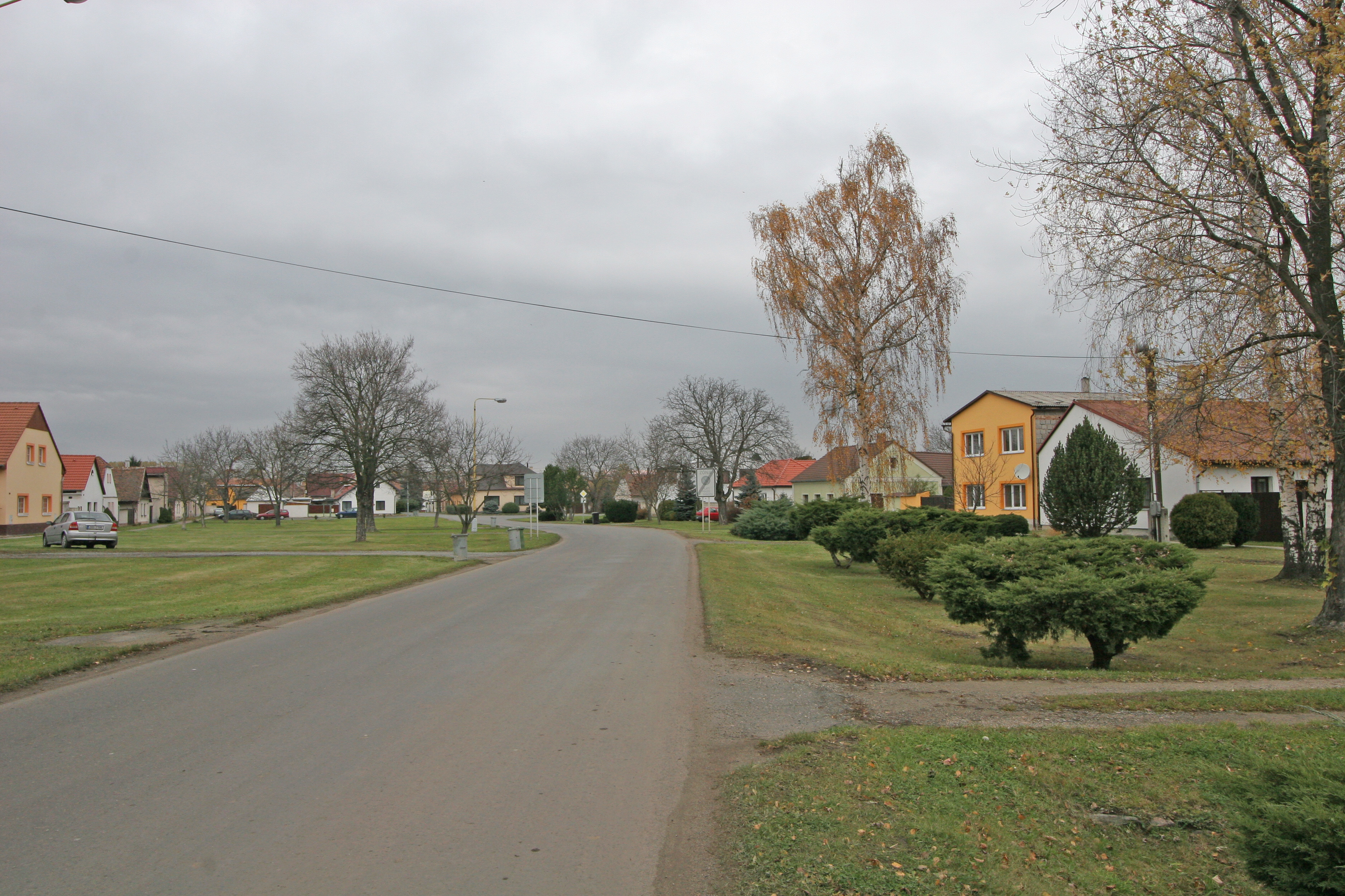 náves v Chotusicích